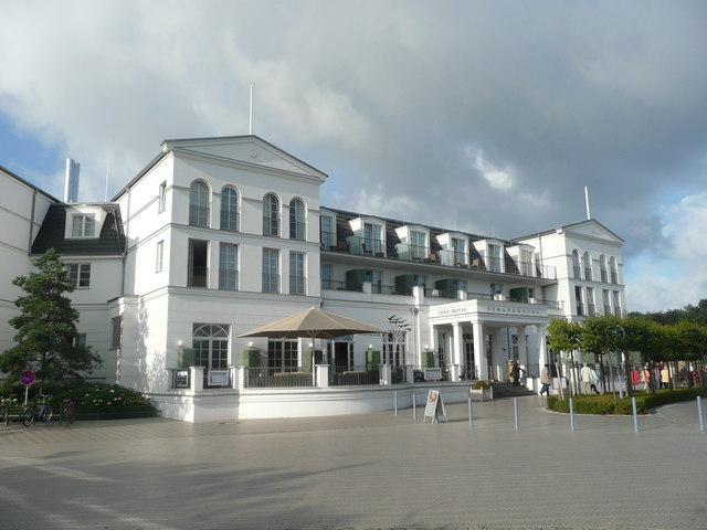 Zingst: Blick auf das Hotel Steigenberger